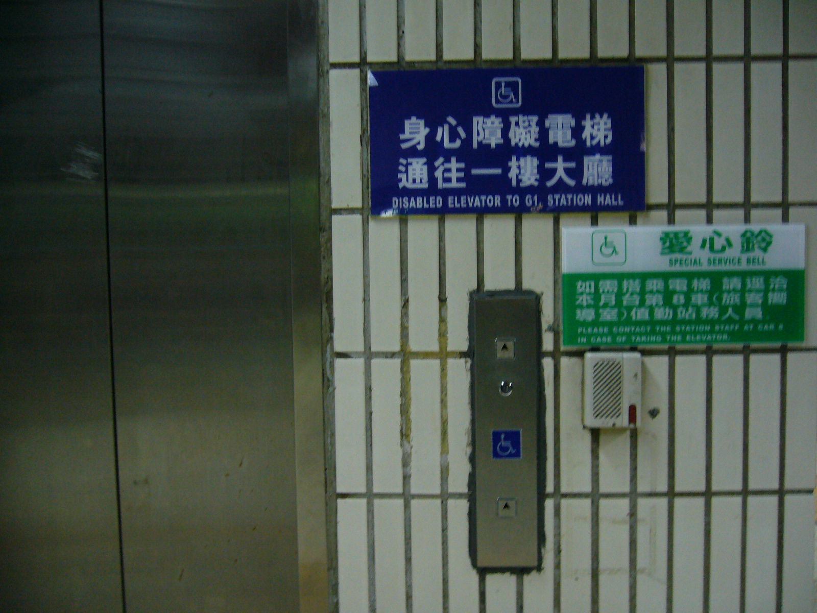 臺灣鐵路管理局臺北車站無障礙電梯